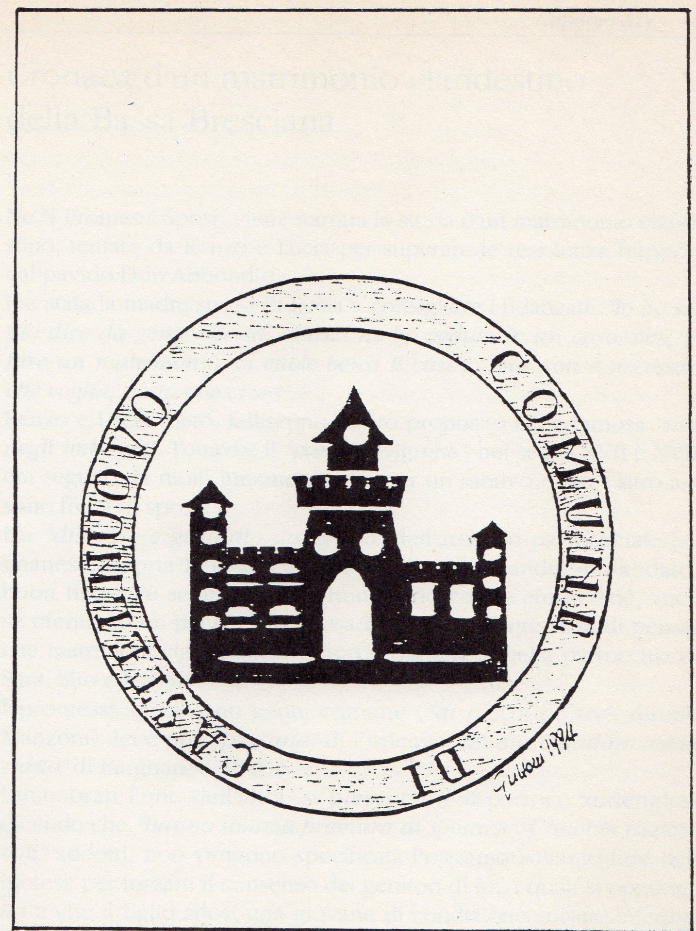 Stemma comunale del 1860, ricavato dalle carte dell'archivio comunale da parte di Giovanni Guzzoni